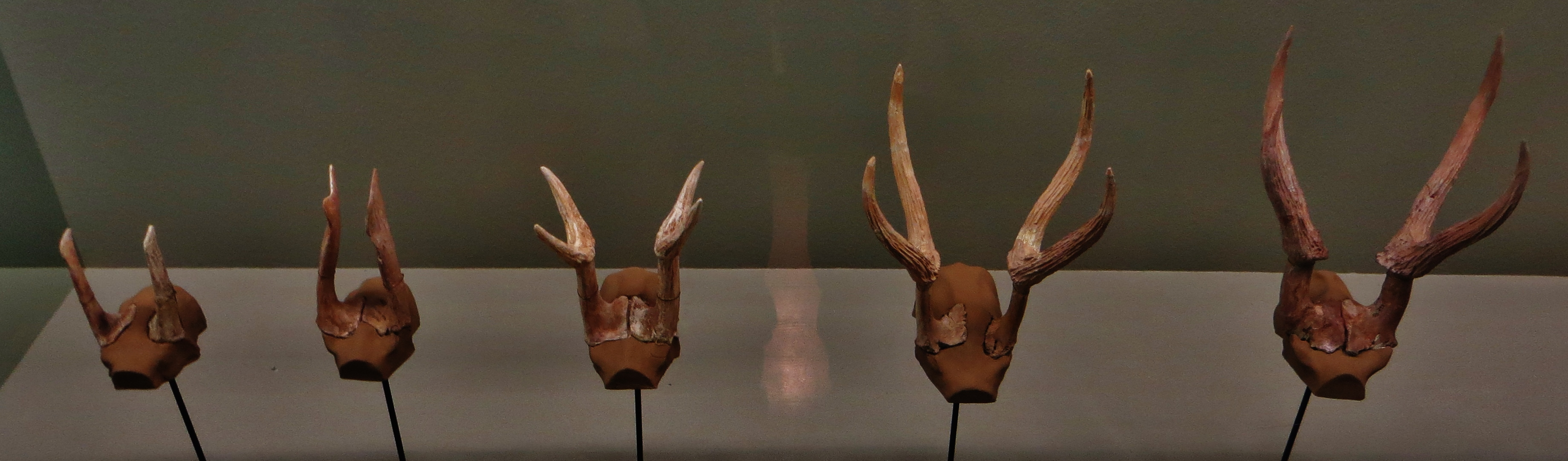 Fossil of Dicrocerus - Took the picture at Natural History Museum, Basel